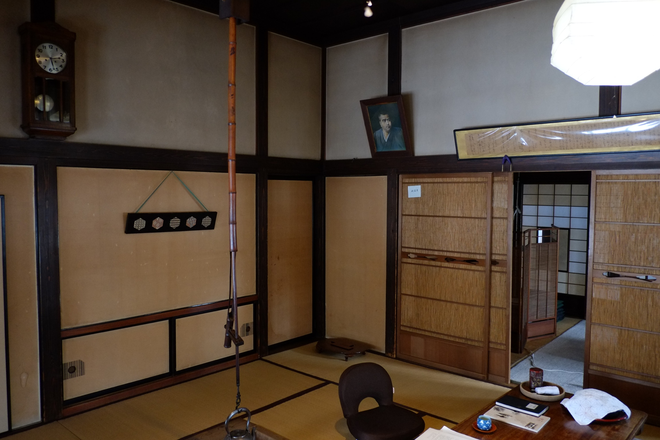 蟹仙洞の旧長谷川家住宅主屋の部屋。